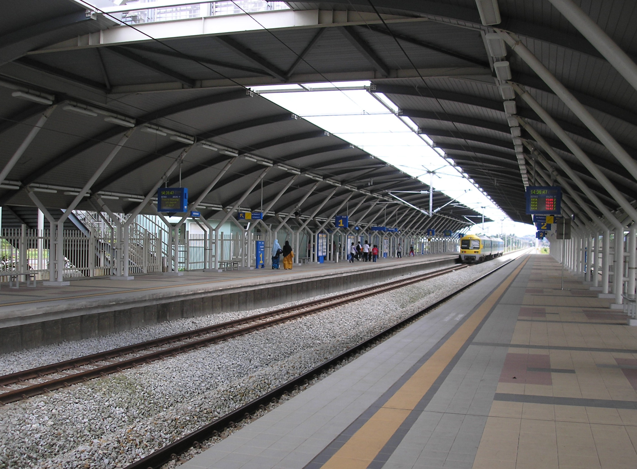 The Serendah station, near Serendah (Rasa-Rawang), Selangor, Malaysia.